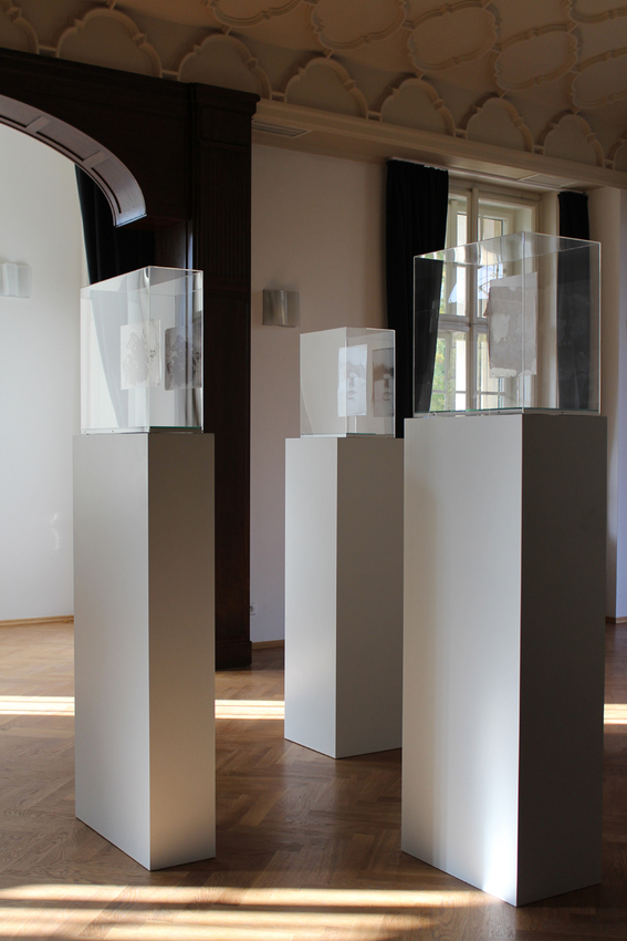 Irena Jůzová, Nanovlákna, 2011